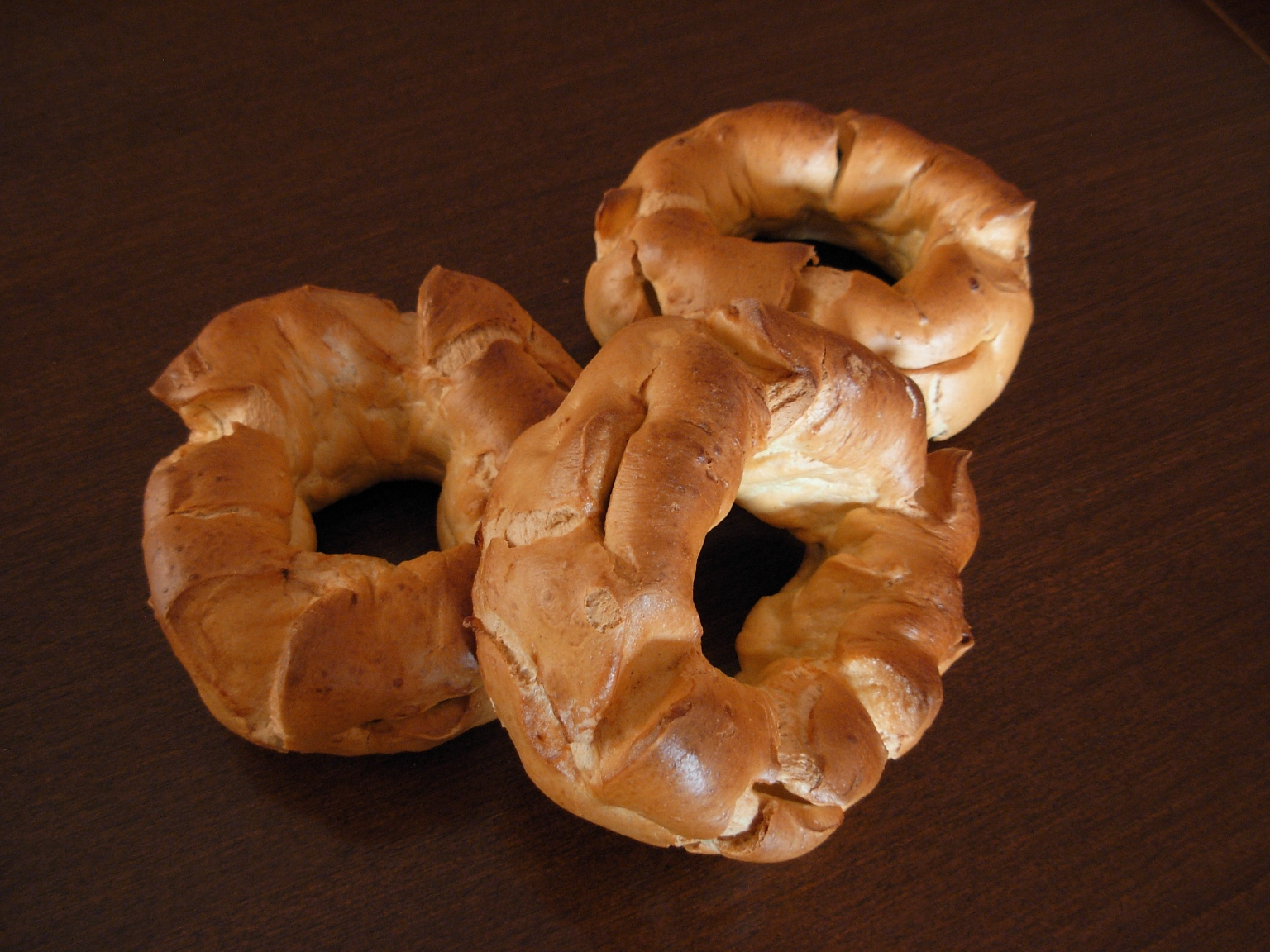 Pareci ili Pereci, vrsta peciva koja se sprema specijalno za Uskrs. Simbolizuju Hristov venac od trnja.